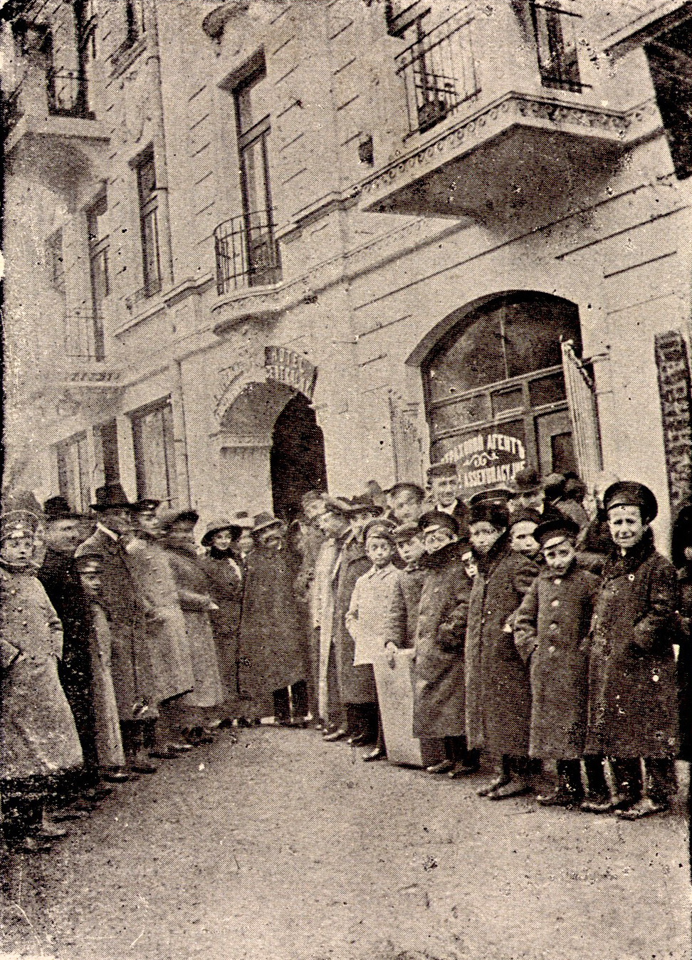 I. L. Perec w mieście swoich urodzin, Zamościu. Rok 1913.